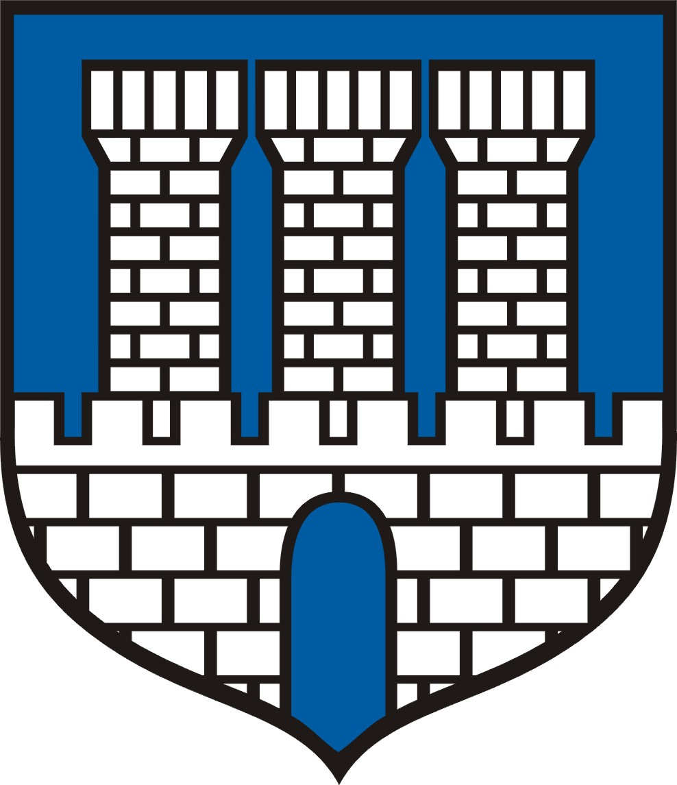 Oficjalny Herb Miasta Gostynina